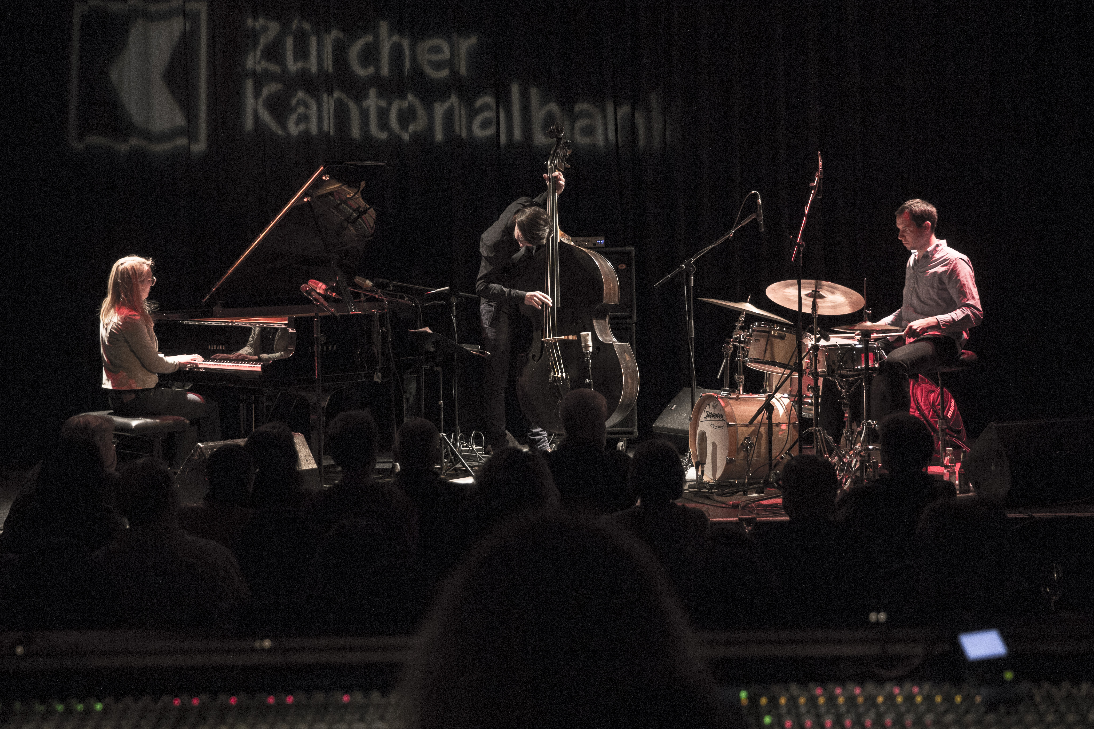 Das Trio von Marie Krüttli (links) mit Lukas Traxel (Mitte) und Martin Perret (rechts), Gewinner des ZKB Jazzpreises 2016, beim Wettbewerb